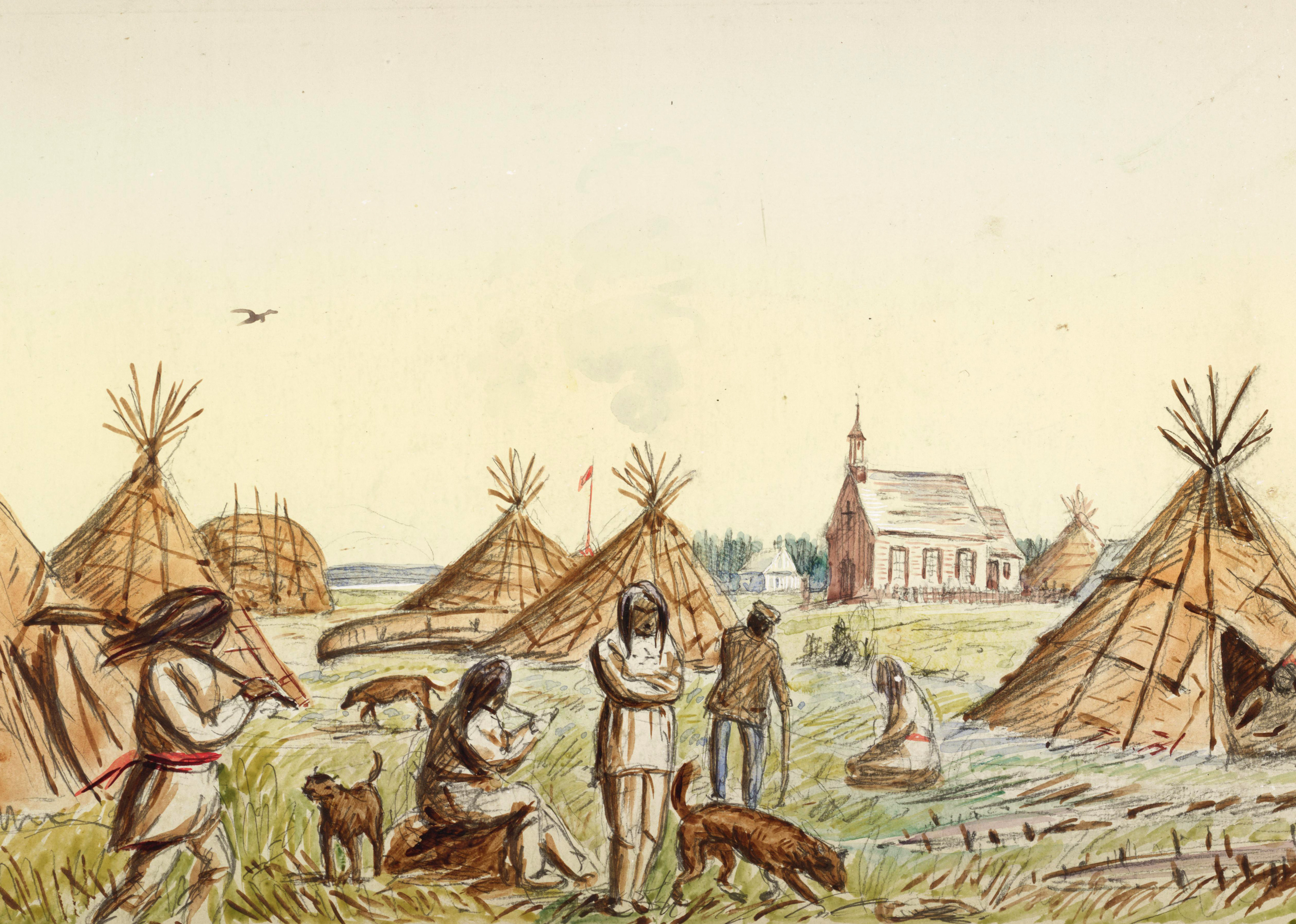 Sept-Îles, circa 1863